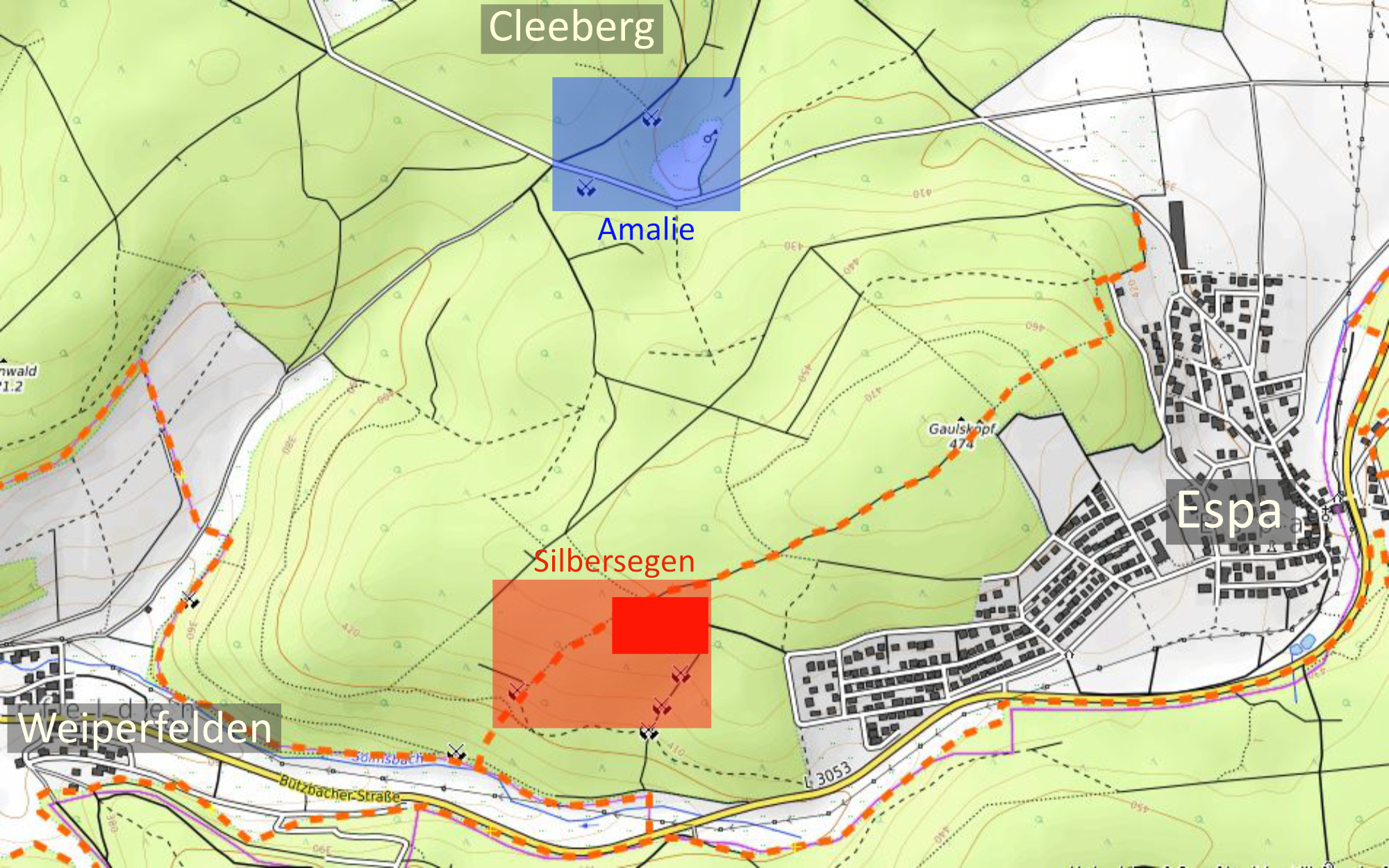 Übersicht über die Gruben Silbersegen und Amalie bei Espa am Gaulskopf im östlichen Taunus. Hellrotː Abbaugebiet Silbersegen, Intensivrotː Hauptabbaugebiet Silbersegen. Blauː Abbaugebiet Amalie. Orange gestrichelte Linienː Gemarkungsgrenzen zwischen Cleeberg, Espa und Weiperfelden. Kartengrundlageː Mitwirkende. Darstellungː SRTM - (CC-BY-SA).